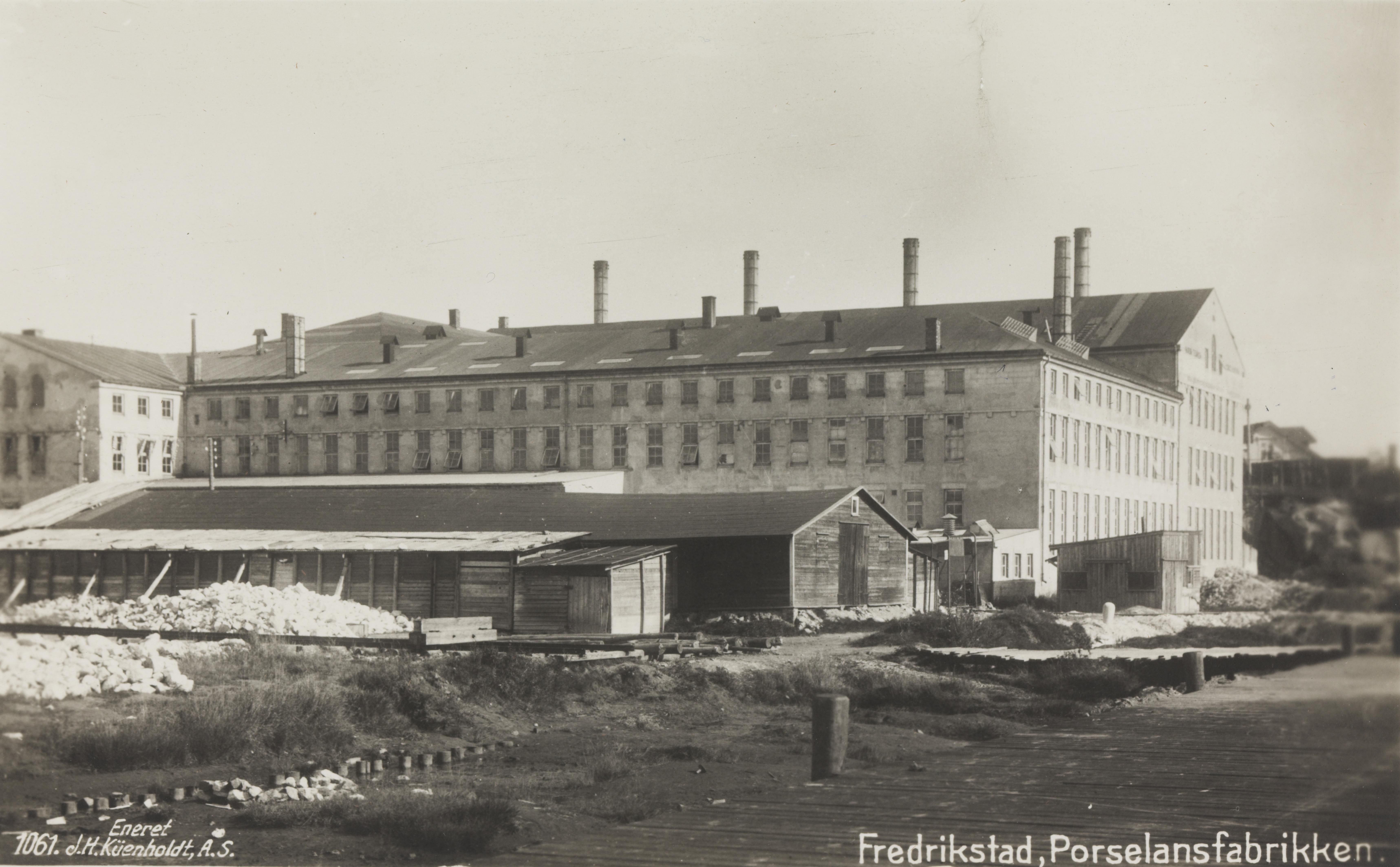 Norsk Teknisk Porselen, Norsk Teknisk Porselensfabrikk i Fredrikstad. Etablert i 1916. Bildet er hentet fra Nasjonalbibliotekets bildesamling